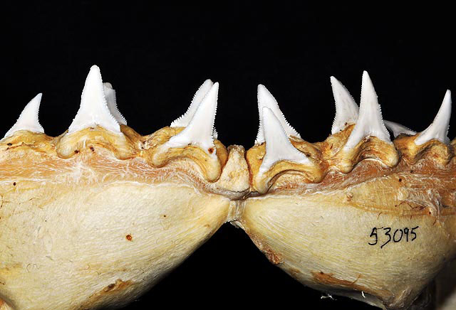 Carcharodon carcharias